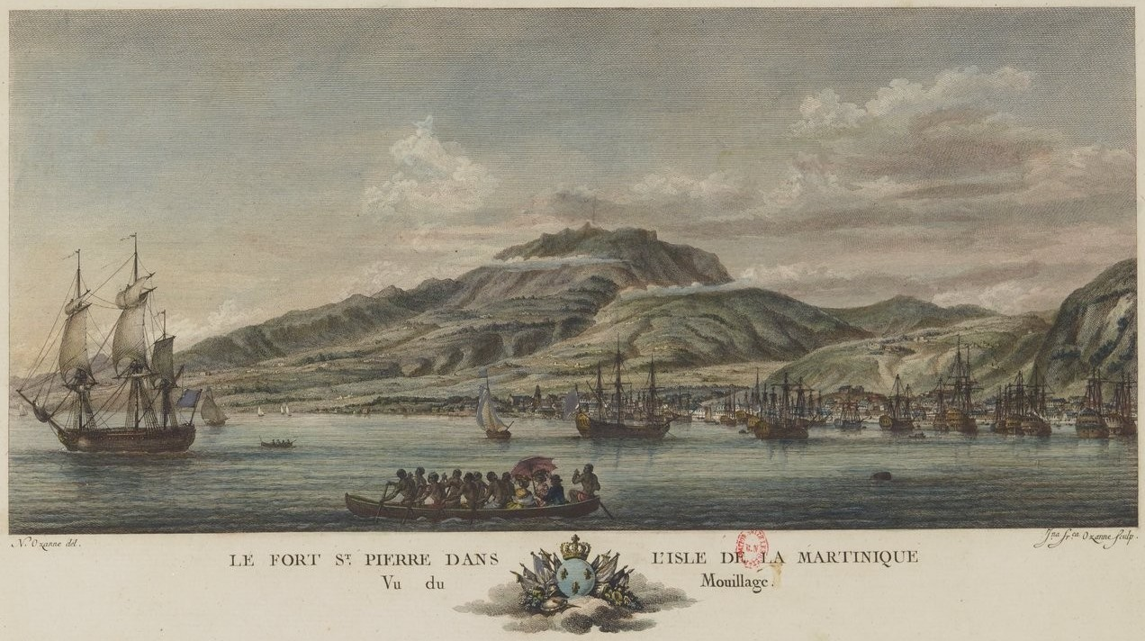 Estampe tirée des Nouvelles vues perspectives des ports de France dessinées pour le Roi par M. Ozanne. Gravées par Y. Le Gouaz en 1776.